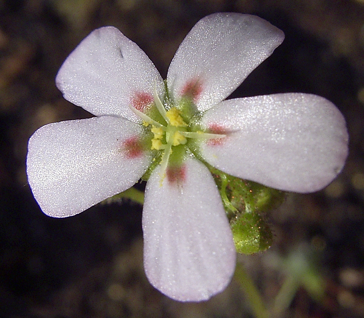 Drosera helodes flora